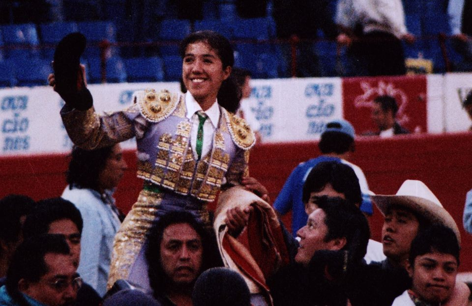 Hilda Tenorio saliendo a hombros de la Plaza México